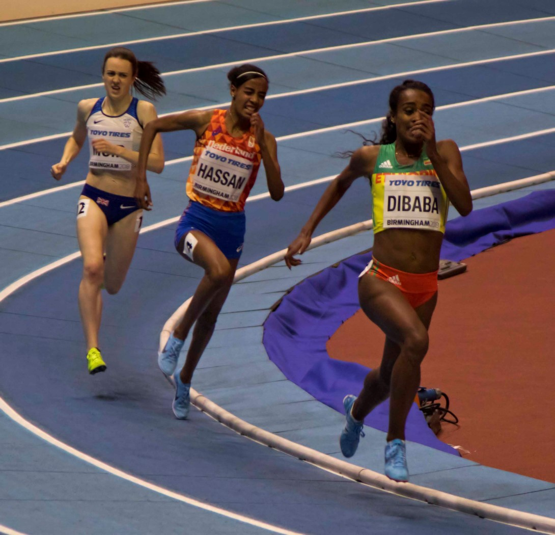 WK010130 laatste ronde 3000m dames